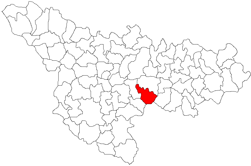 Buziaş, judetul Timis Licensing Categorie:Hărţi ale judeţului Timiş